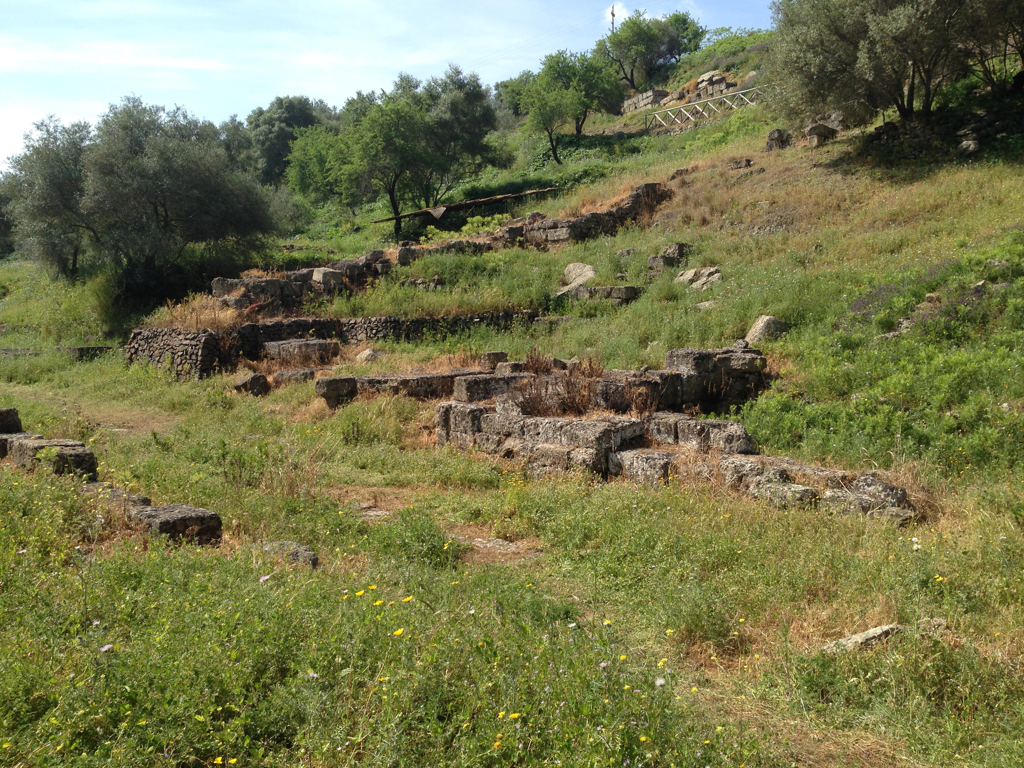 Fortificazioni arcaiche Leontinoi